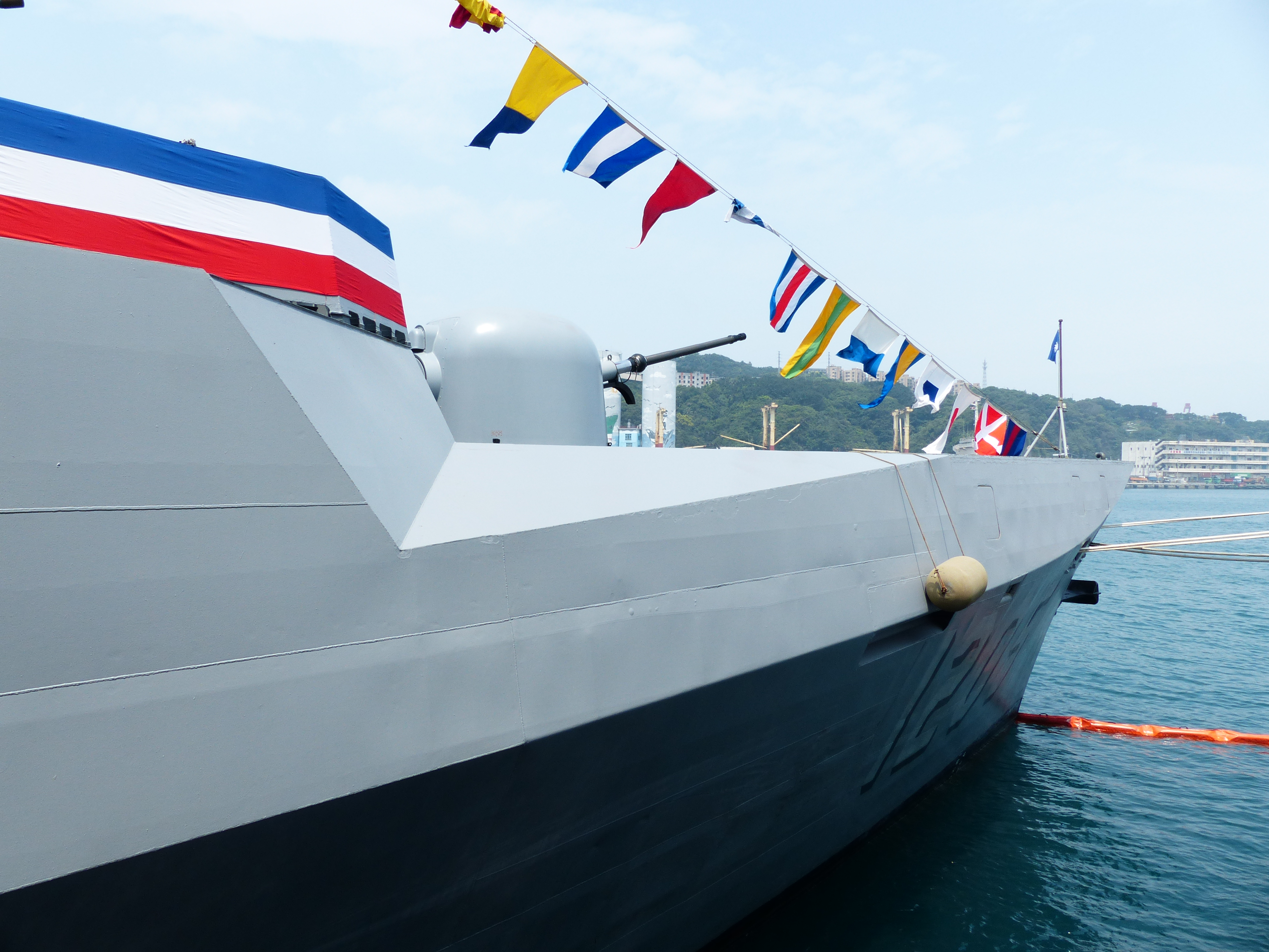 巡防艦昆明（PFG-1205）艦首右側，攝於並泊之巡防艦子儀艦首左舷。